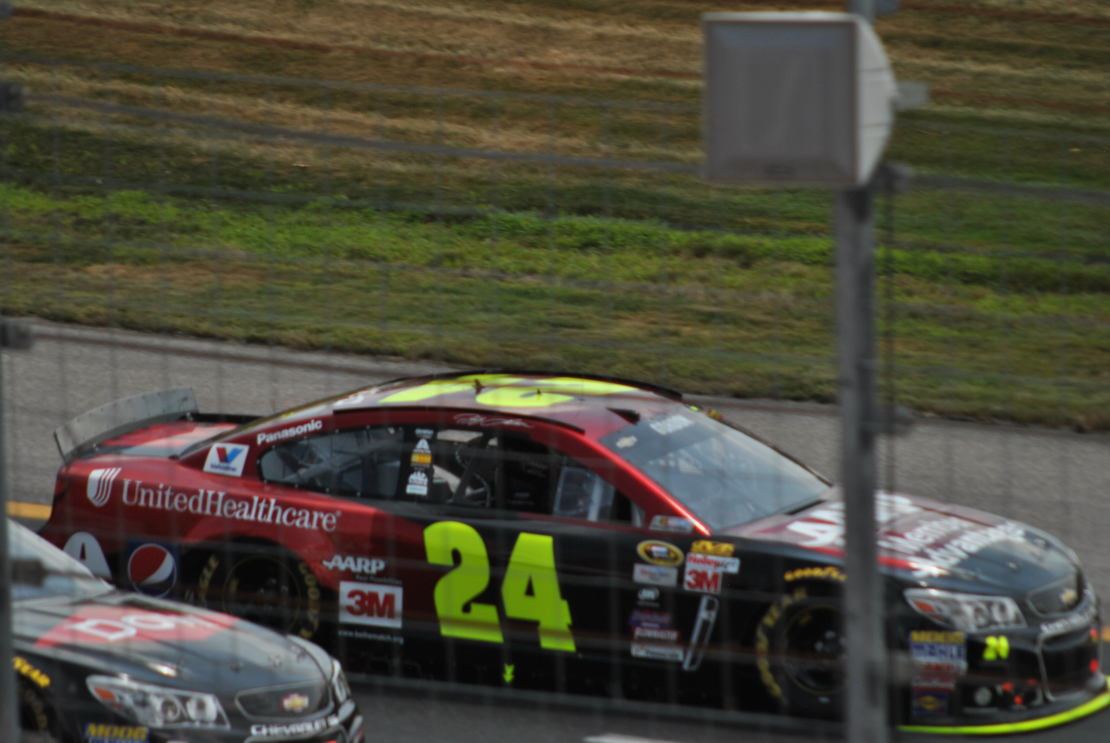 Jeff Gordon